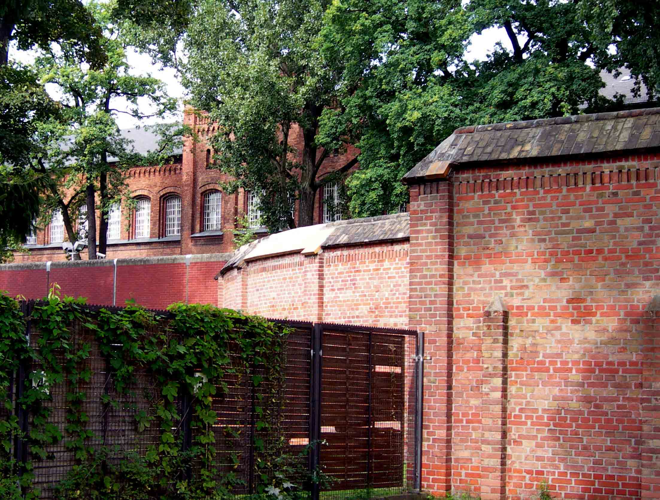 Ploetzensee prison